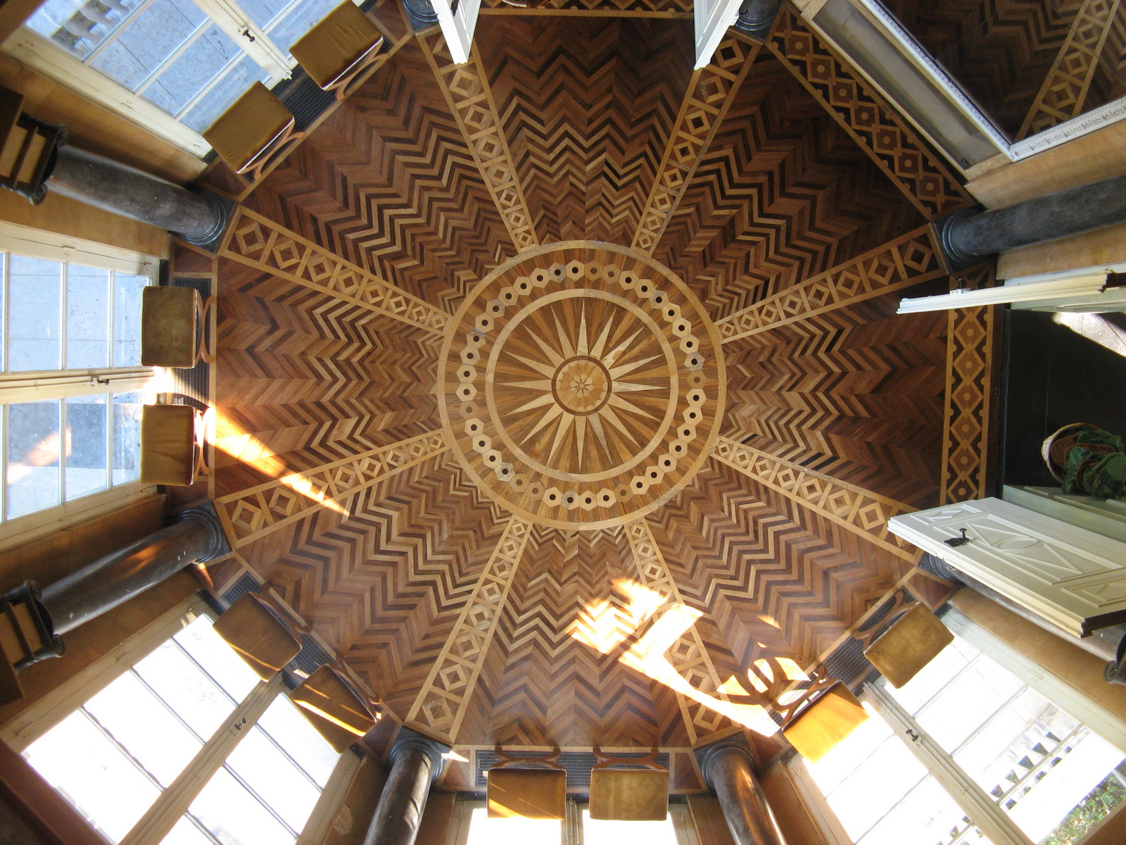 De Notelaer